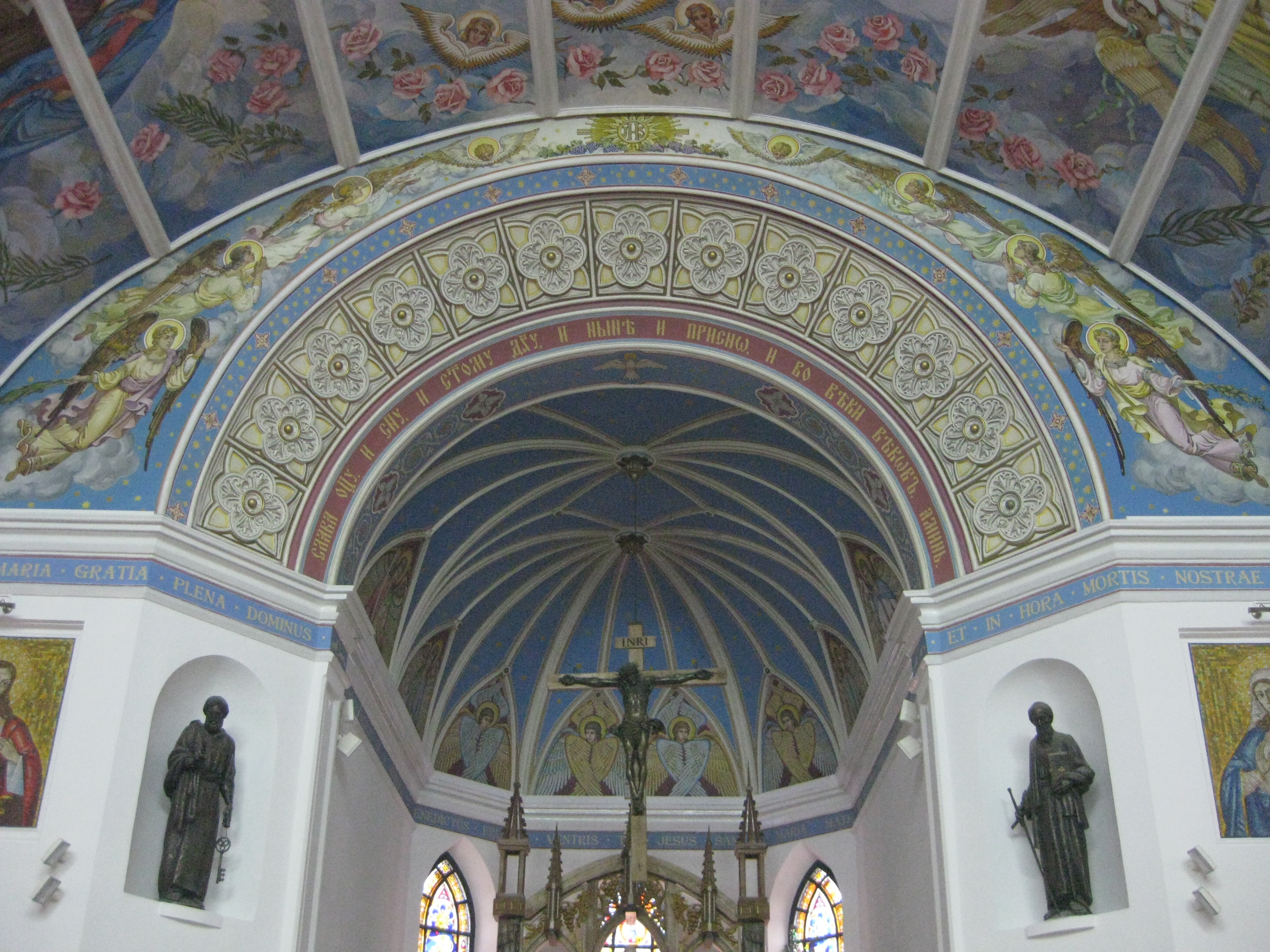 Свод собора Харькова